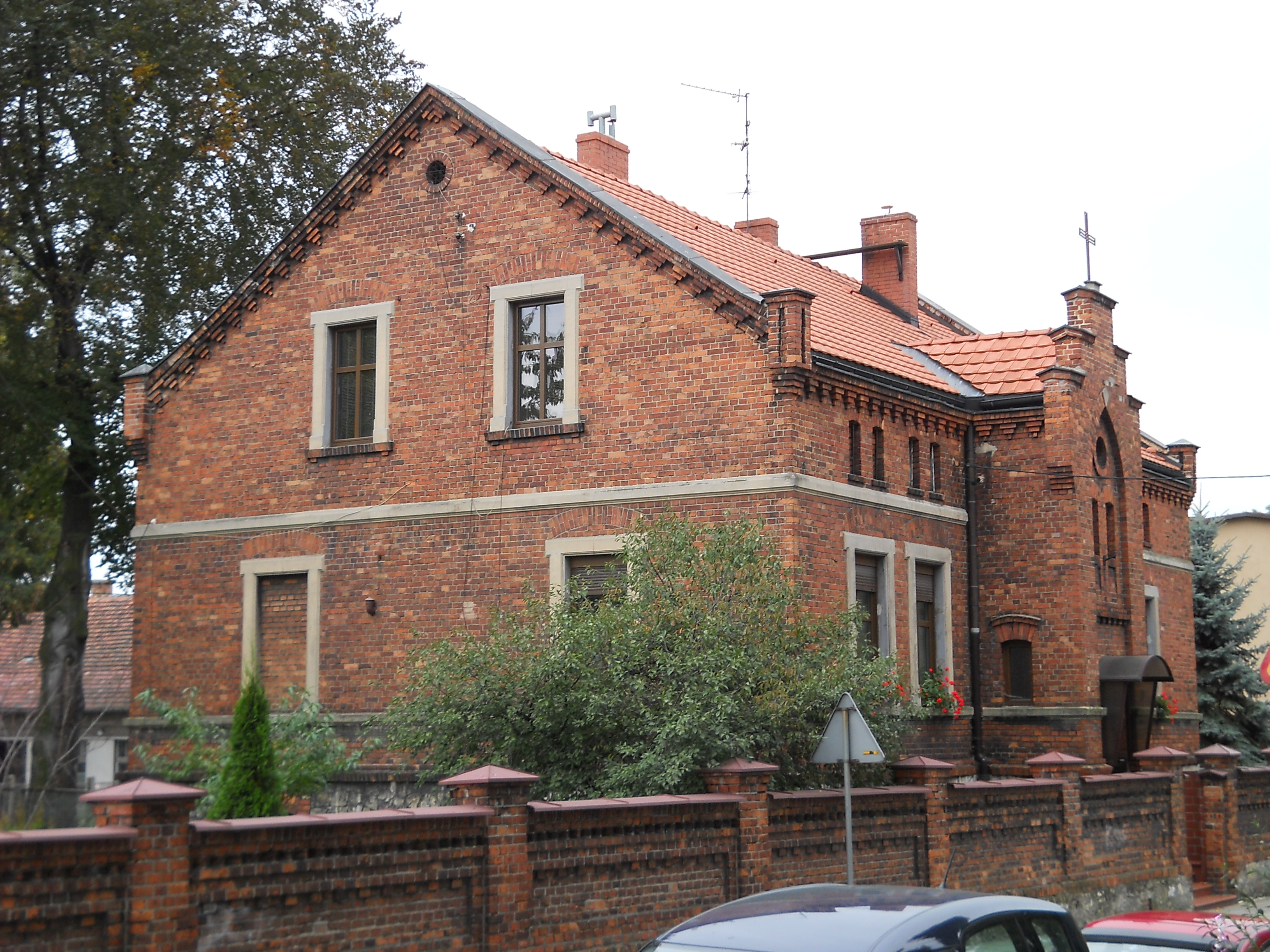 Pyskowice, ul. Poniatowskiego 10 - kościół parafialny pw. św. Mikołaja, plebania (zabytek nr A/289/60 z 7.03.1960)